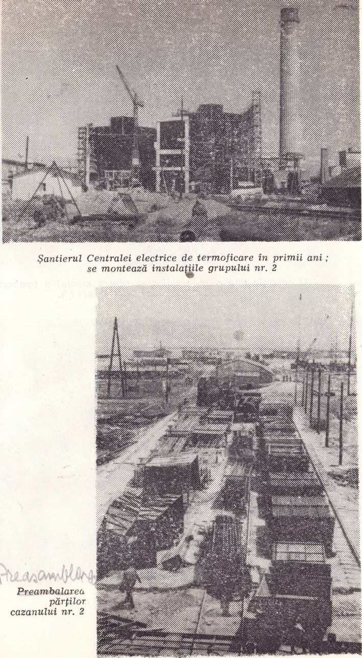 Construcţia Unităţii nr. 2 (cazane şi turbine) în anii 60'